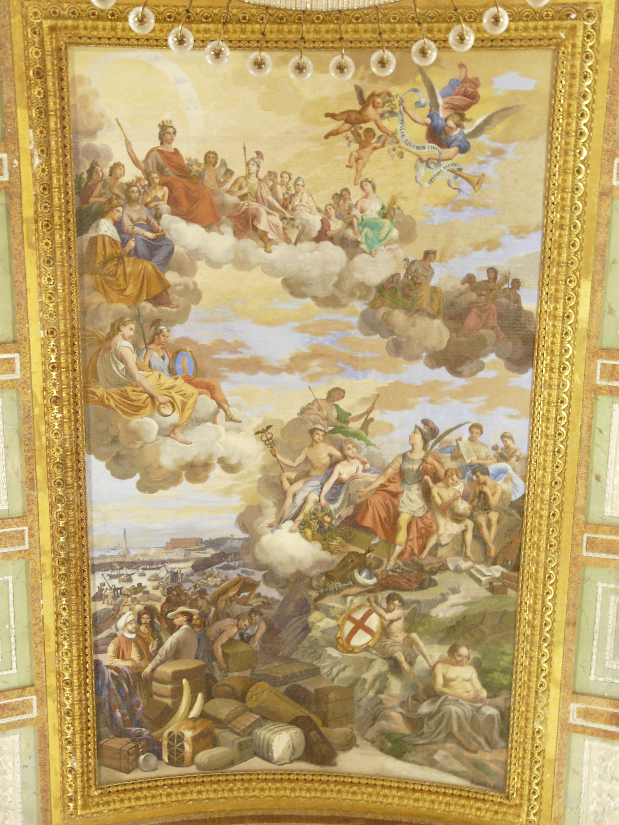 Sala del Maggior Consiglio, Palazzo Ducale, Genova, Liguria, Italia